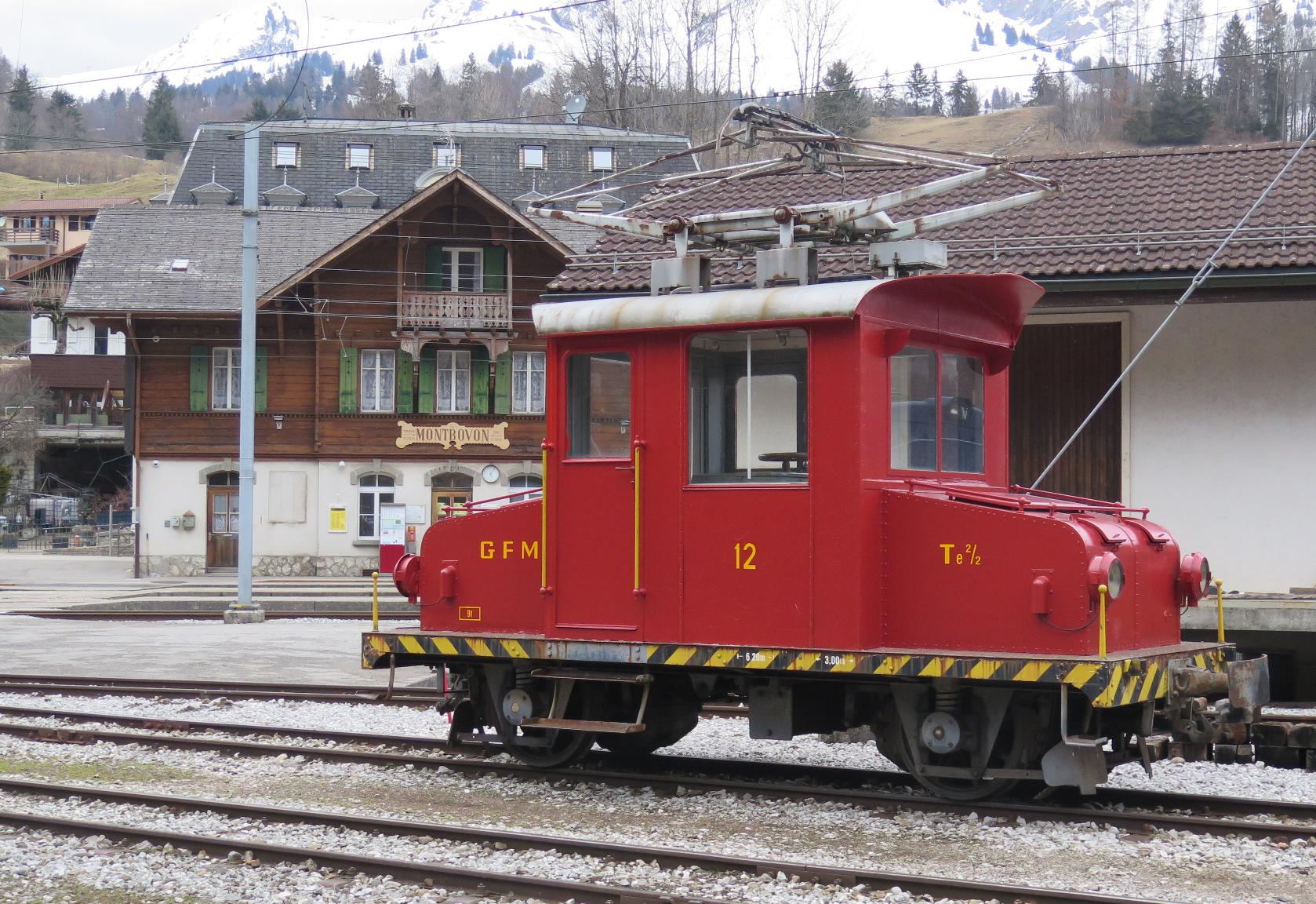 Traktor Te 2/2 12 der Chemins de fer fribourgeois Gruyère–Fribourg–Morat (GFM) abgeliefert 1913 im Bahnhof Montbovon.